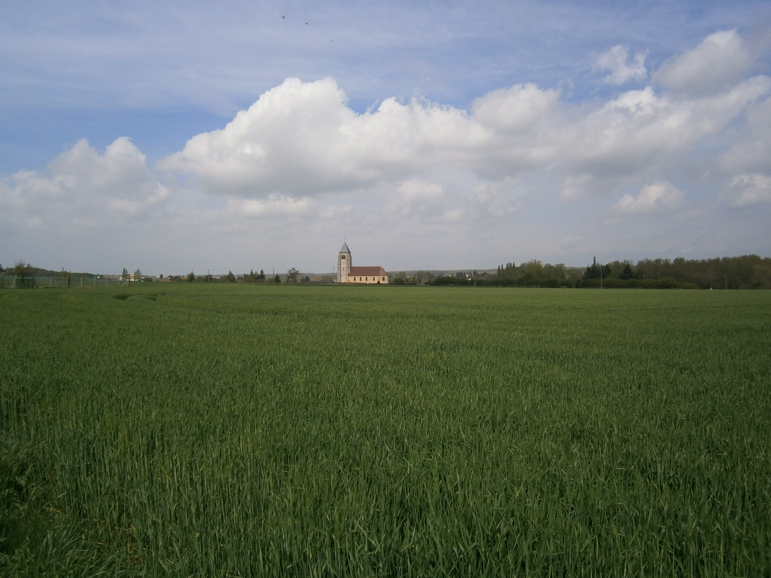 Hanches (28) : L'église du Paty.